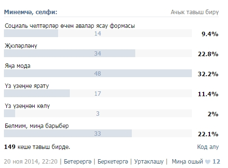 Татарча/tatarça: Селфи турында сораштыру нәтиҗәләре